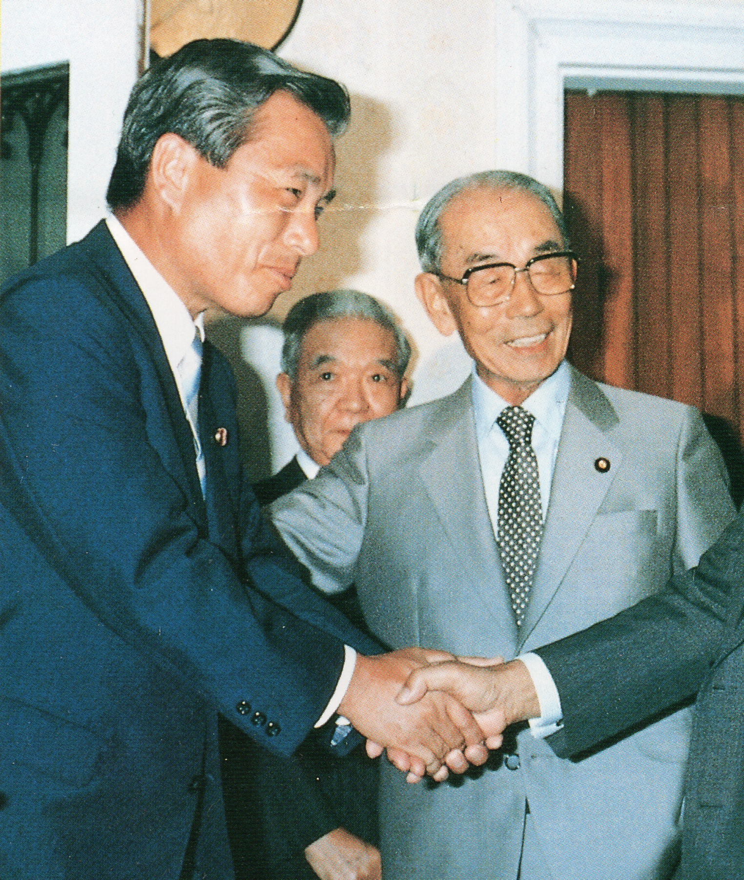 杉浦正健衆議院議員、福田赳夫元首相。1989年頃。